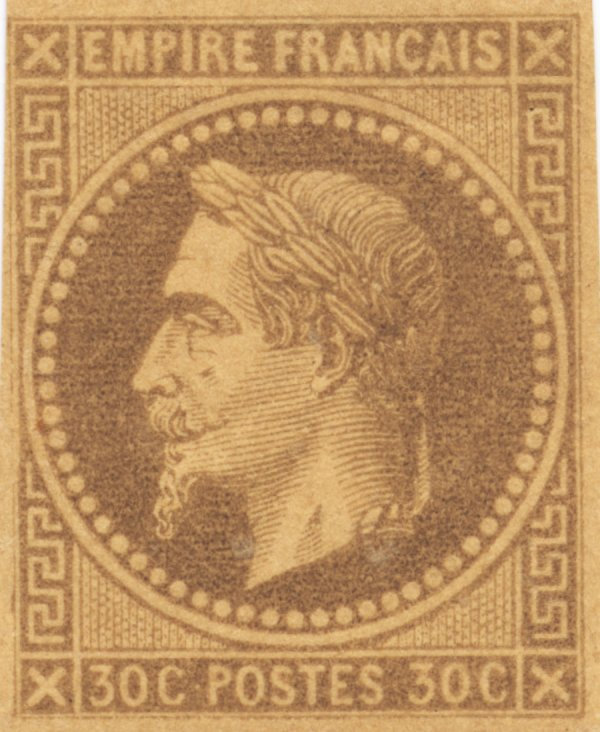 Timbre Napoléon III lauré des Colonies françaises (1871)